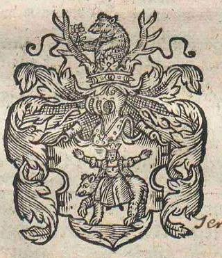 Herb Rawicz z "Gniazda cnoty .." B. Paprockiego